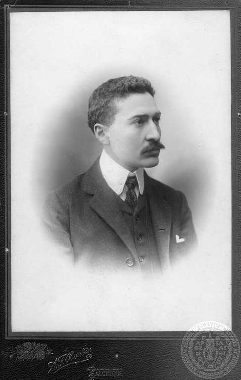 Йон Драгумис